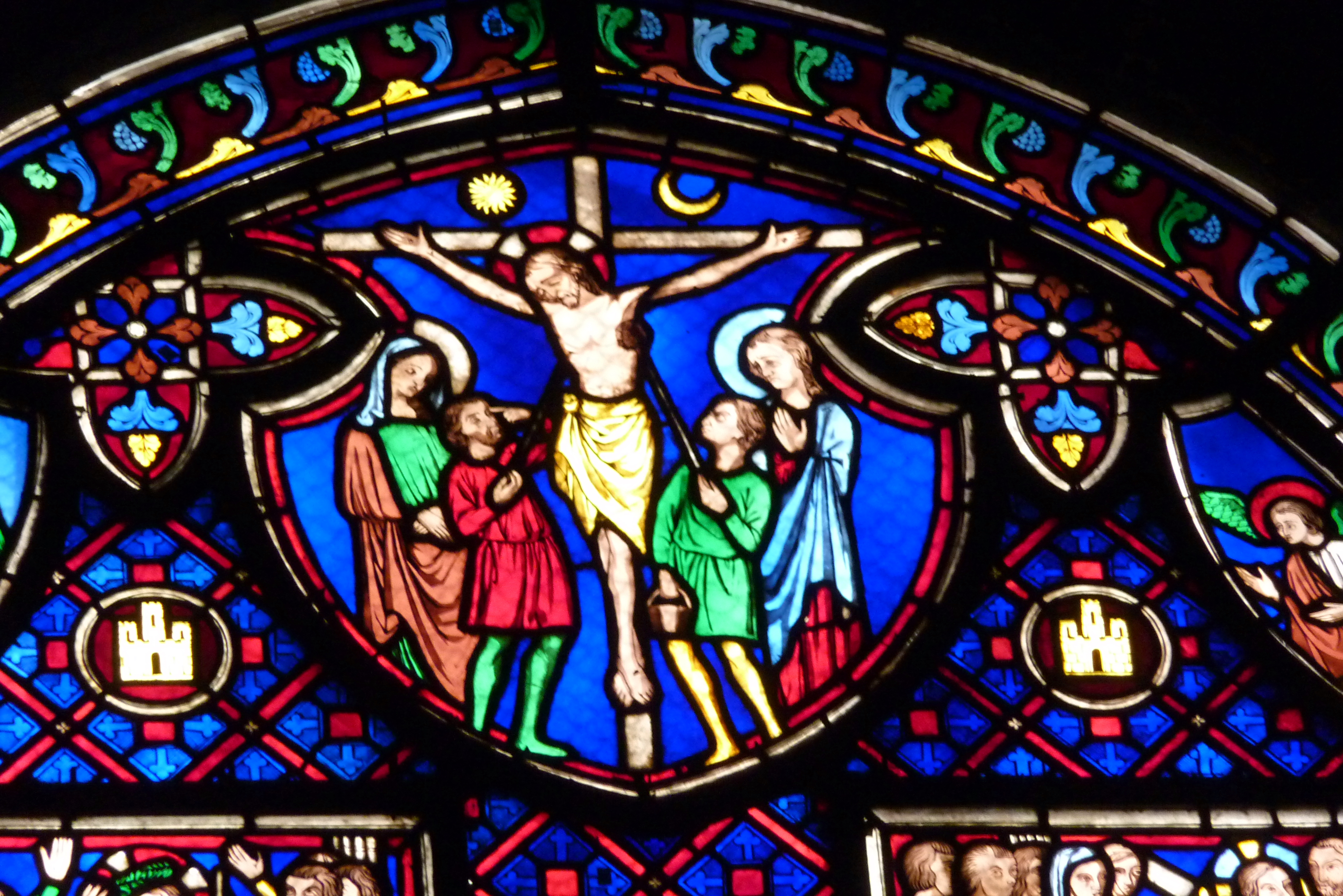 Detail eines Bleiglasfensters in der Kirche St-Germain-l’Auxerrois in Paris, Darstellung: Kreuzigung, 1838 hergestellt von Louis Steinheil und Reboulleau, Entwurf: Jean-Baptiste Lassus und Adolphe Napoléon Didron (siehe Élisabeth Pillet: Le vitrail à Paris au XIXe siècle. Entretenir, conserver, restaurer, (Corpus Vitrearum France - Études IX) Presses Universitaires de Rennes, Rennes 2010, S. 86f, ISBN 978-2-7535-0945-0)